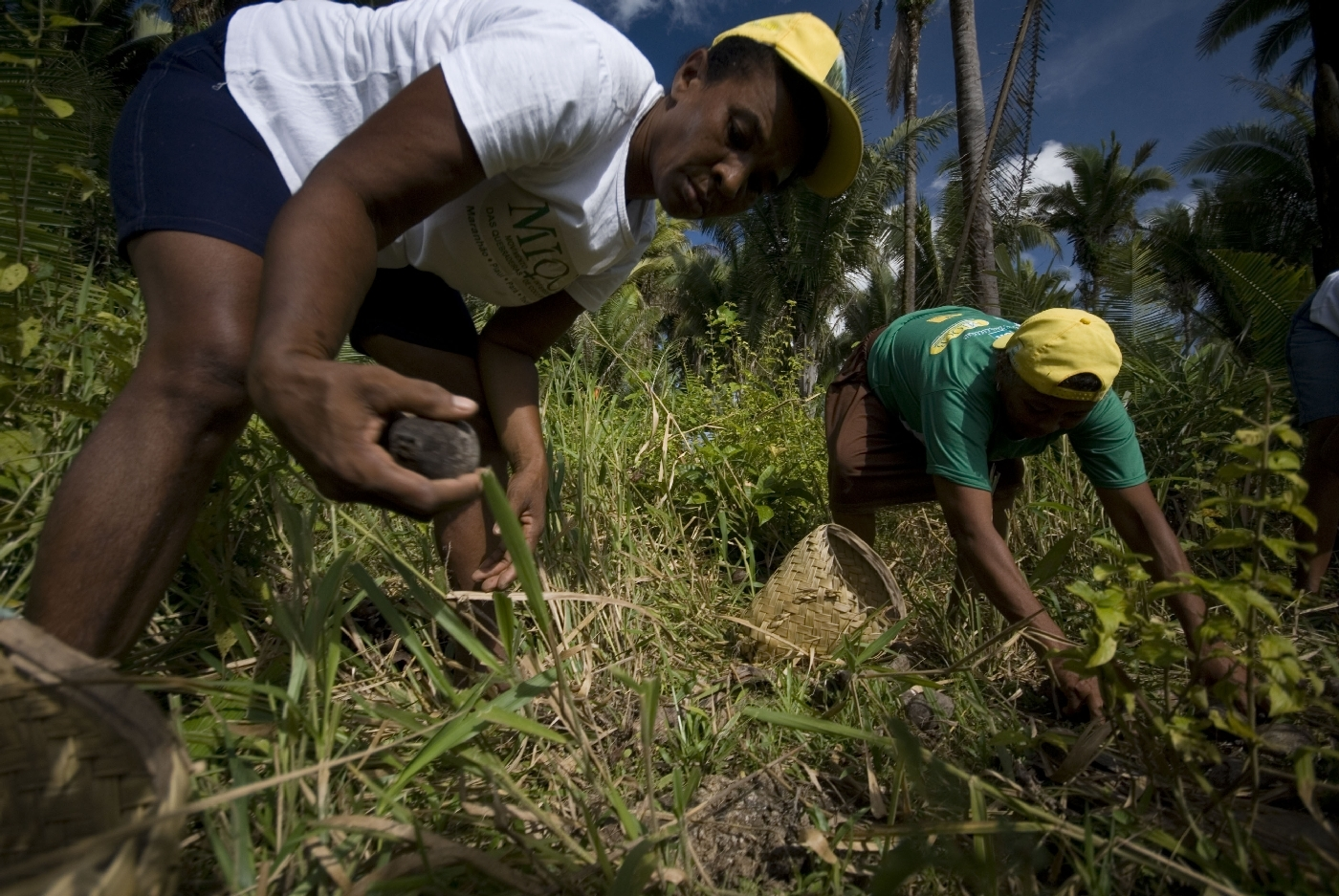 Sammeln der Babacu-Nüsse in Maranhao (Brasilien).